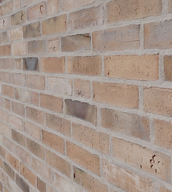 Feigenblattziegel Fassade St. Nathanael August 2019